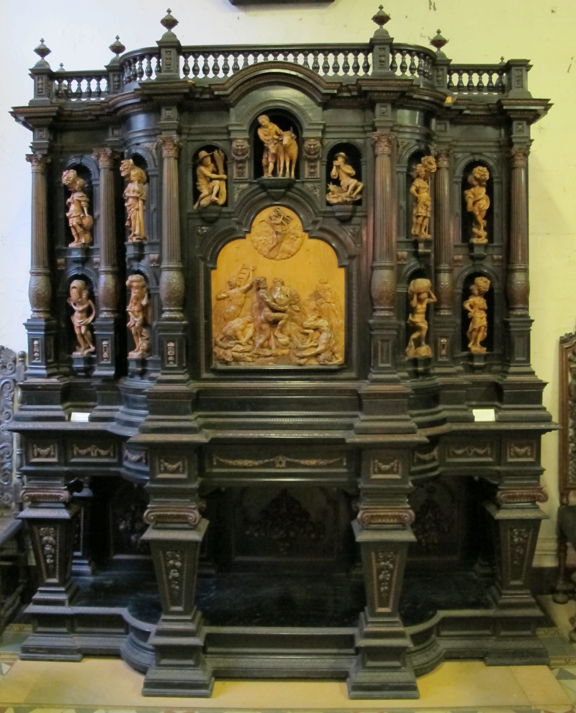 Buffet, germania del sud, 1856 ca.